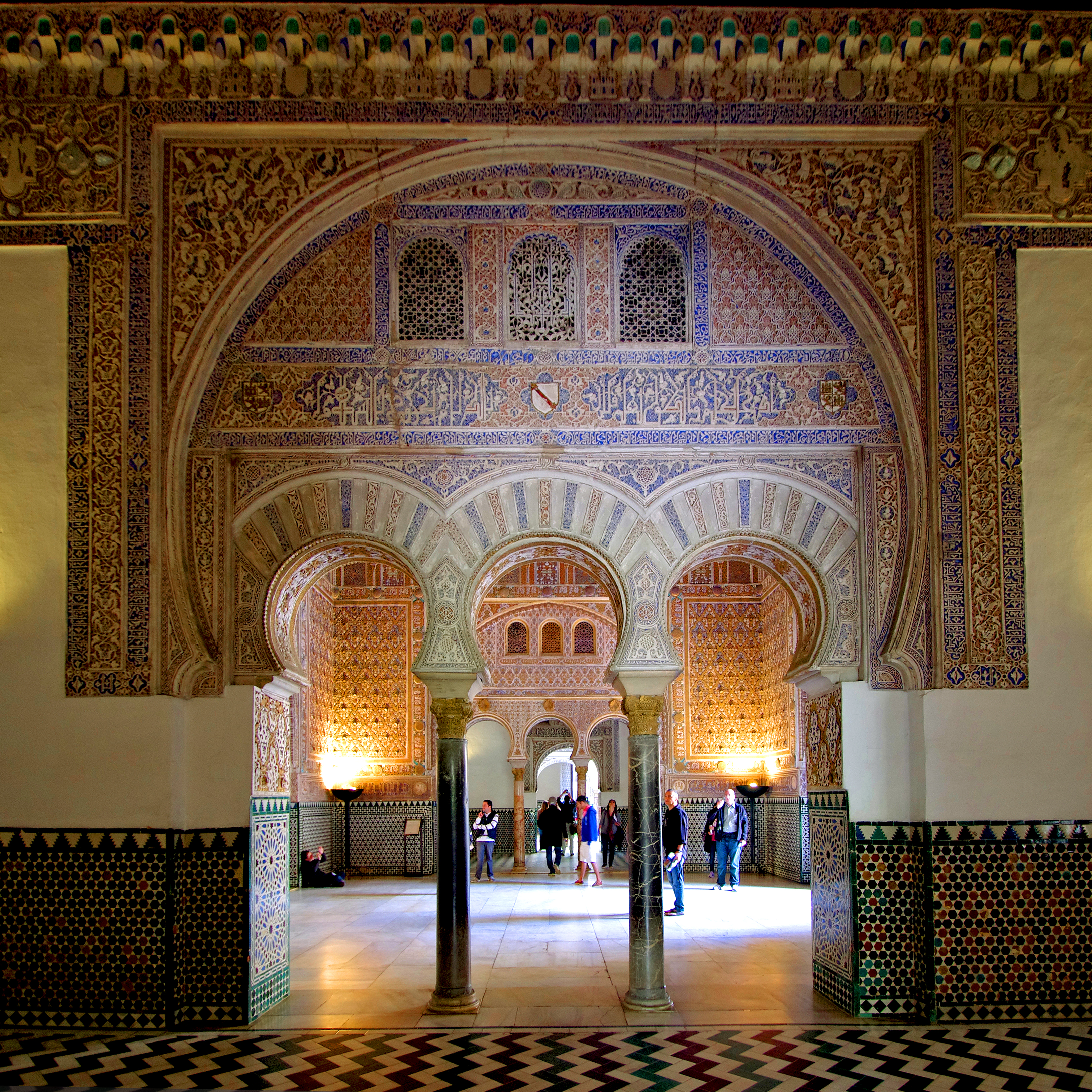 Interior de los Reales Alcázares de Sevilla